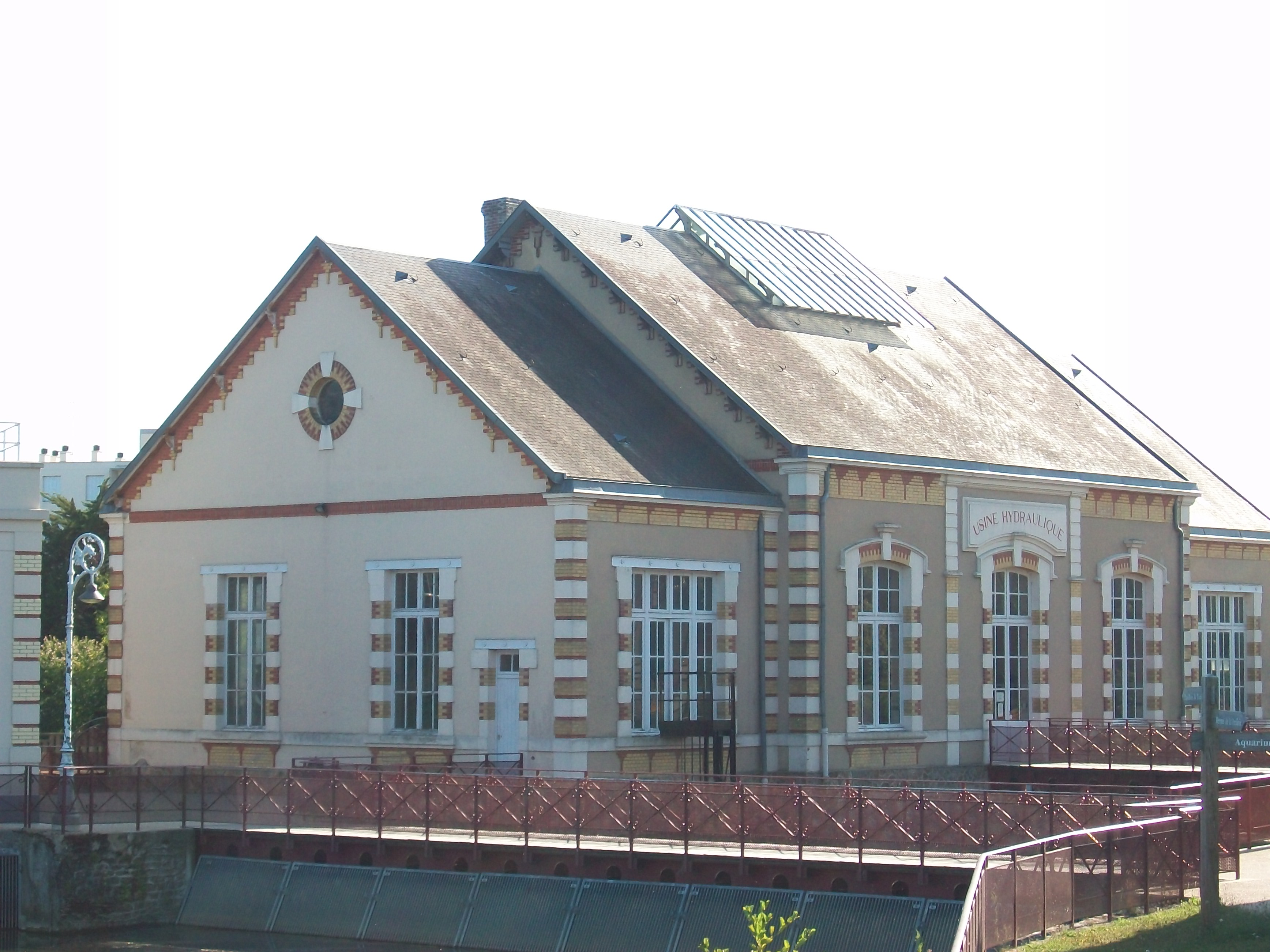 L'ancienne usine hydraulique du Mans (années 1900), tout près de l'actuelle maison de l'eau.